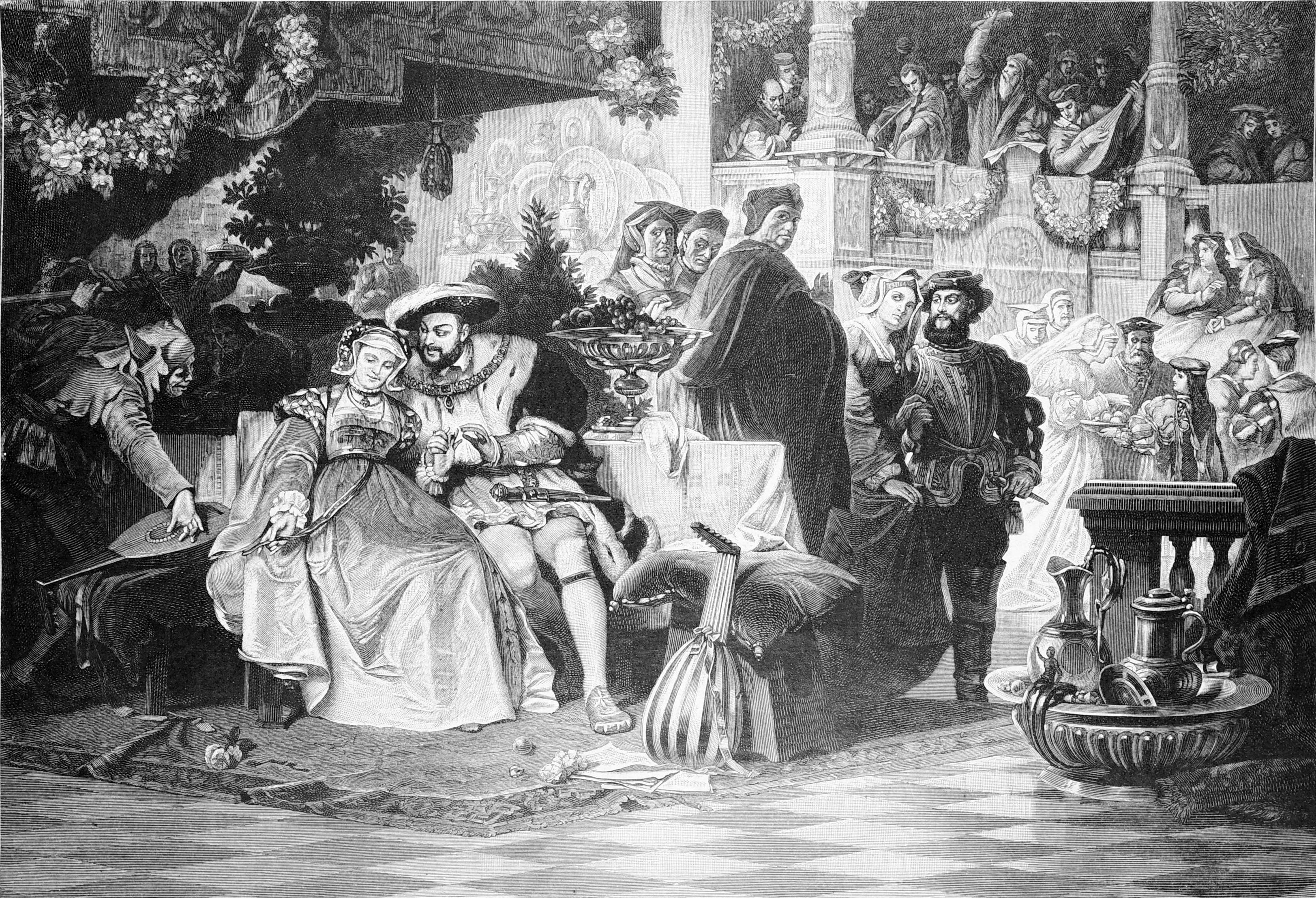 Anne Boleyn et Henry VIII